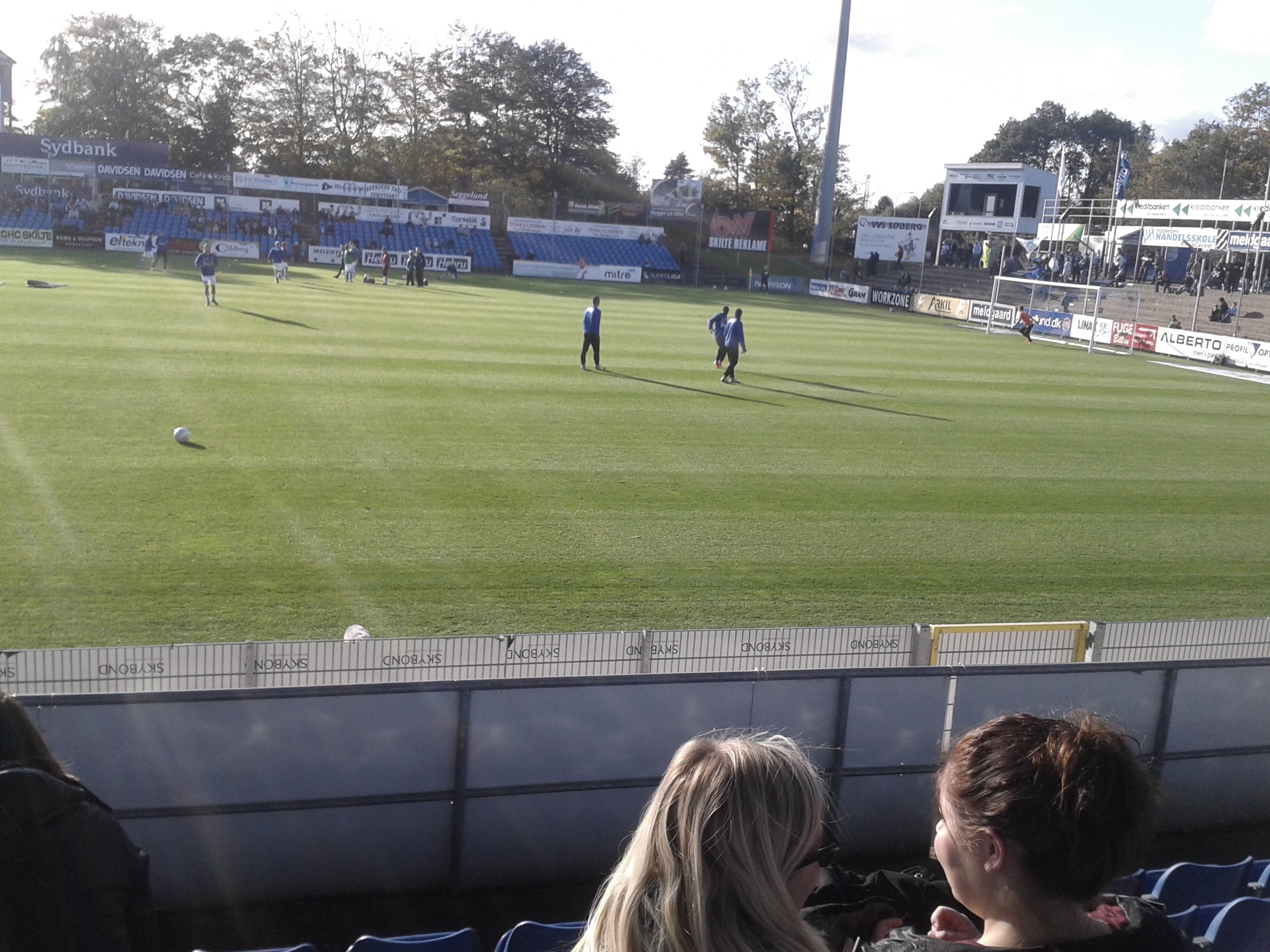 Opvarmning før 3-0 nederlaget mod AGF på haderslev fodboldstadion